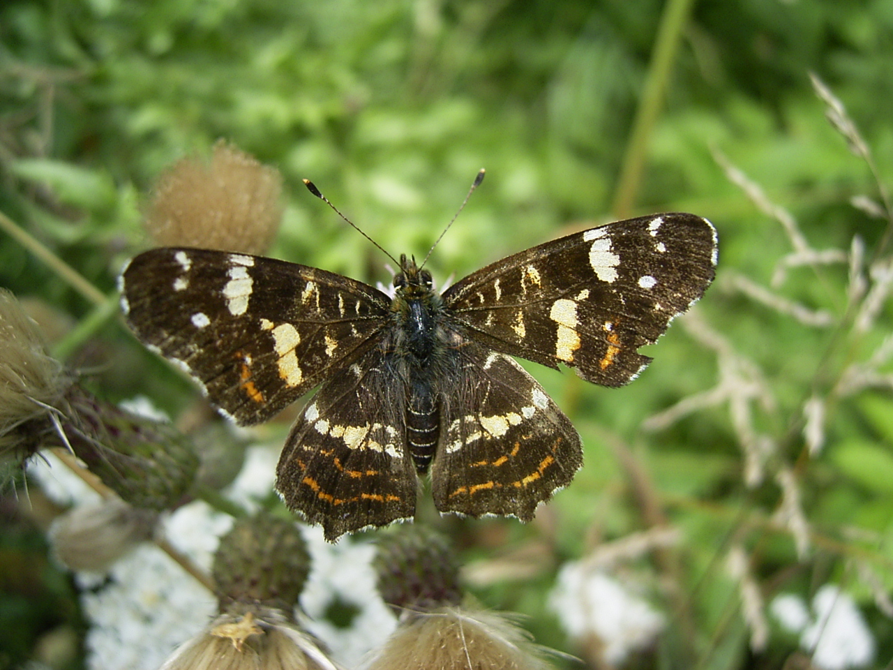 Araschnia levana